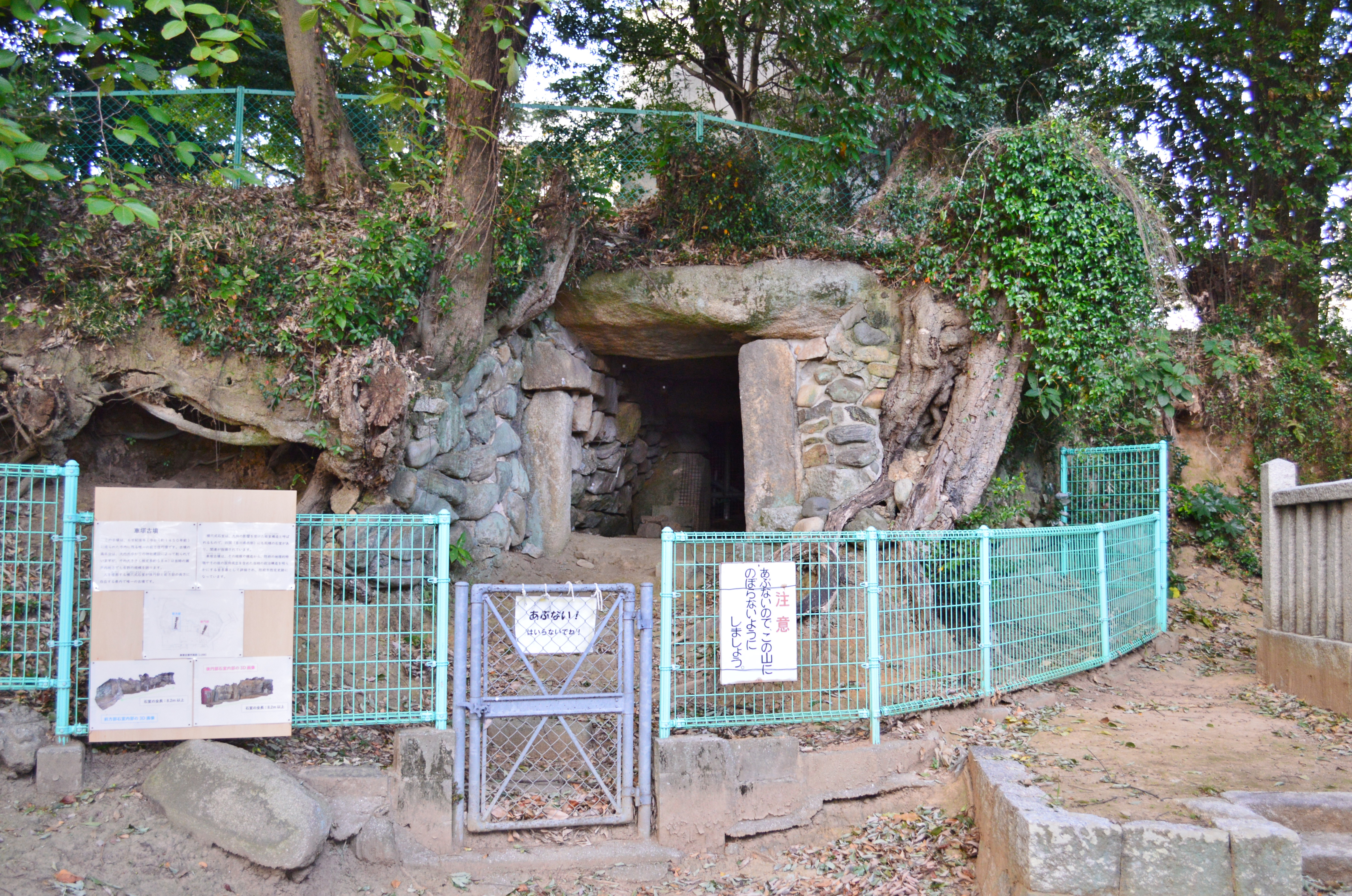 車塚古墳 (防府市) 前方部石室入り口